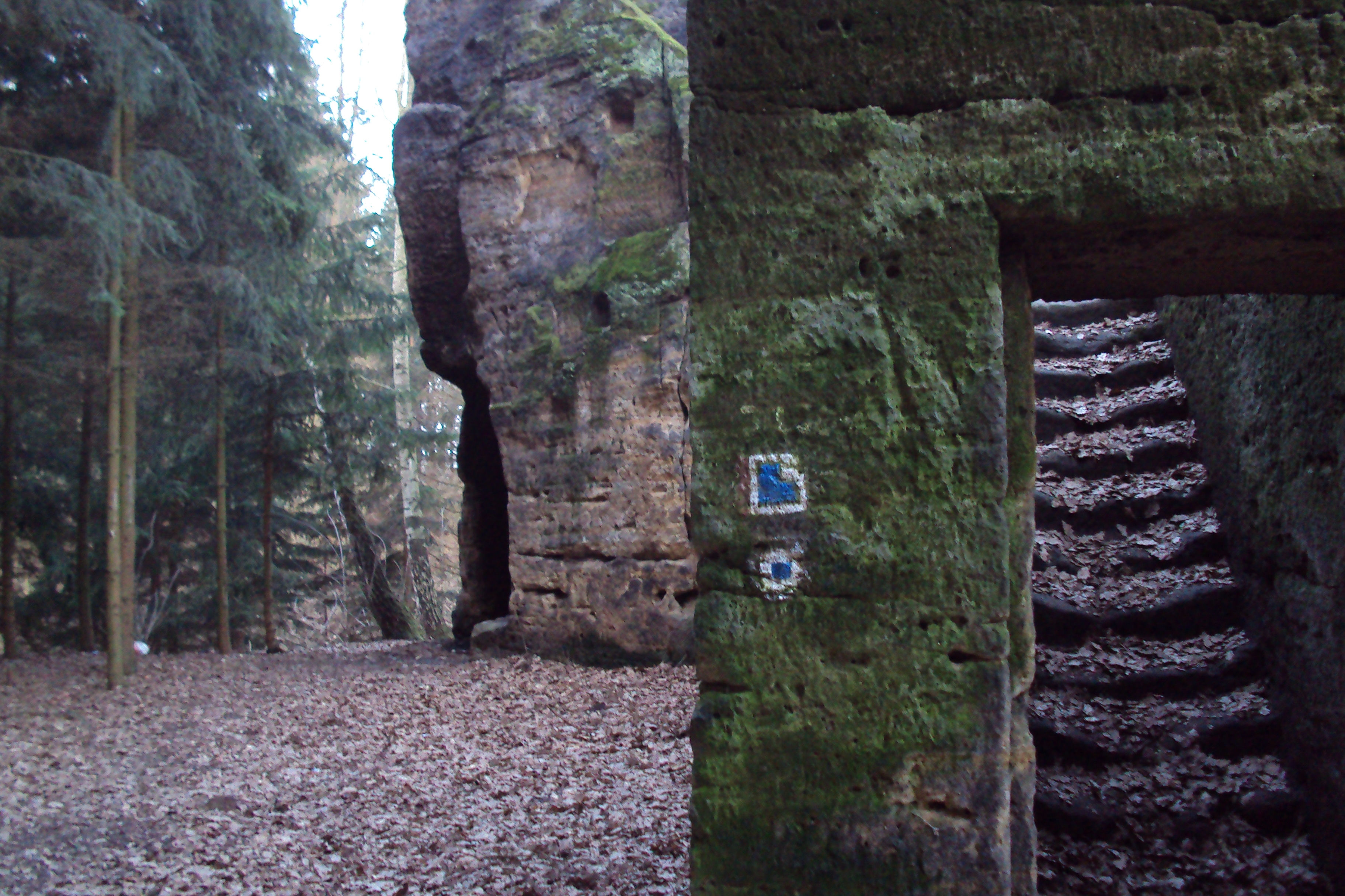 Zřícenina Jiljova u Holan